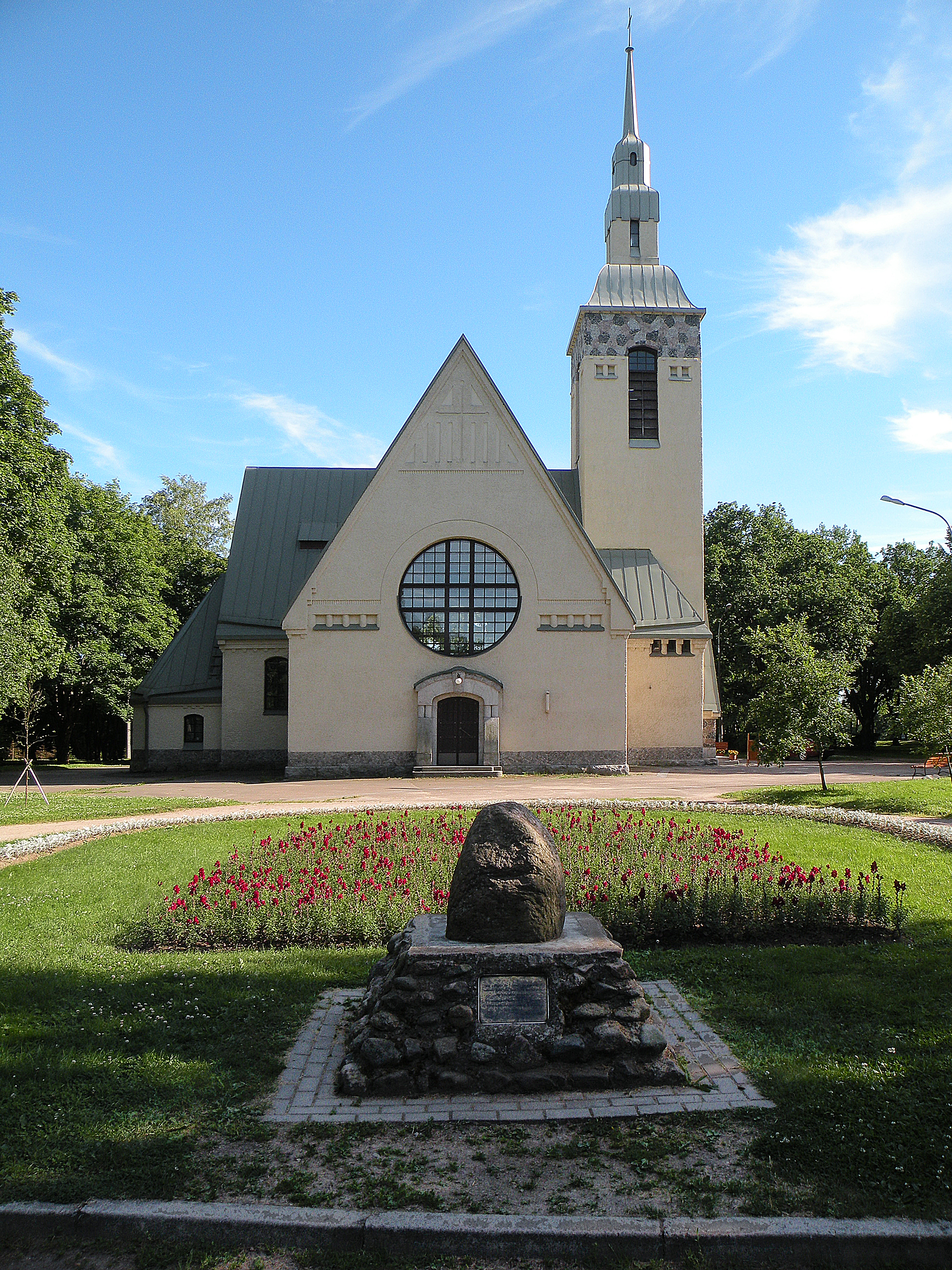 Памятник териокийцам, павшим в войне1939 - 1944 года и кирха